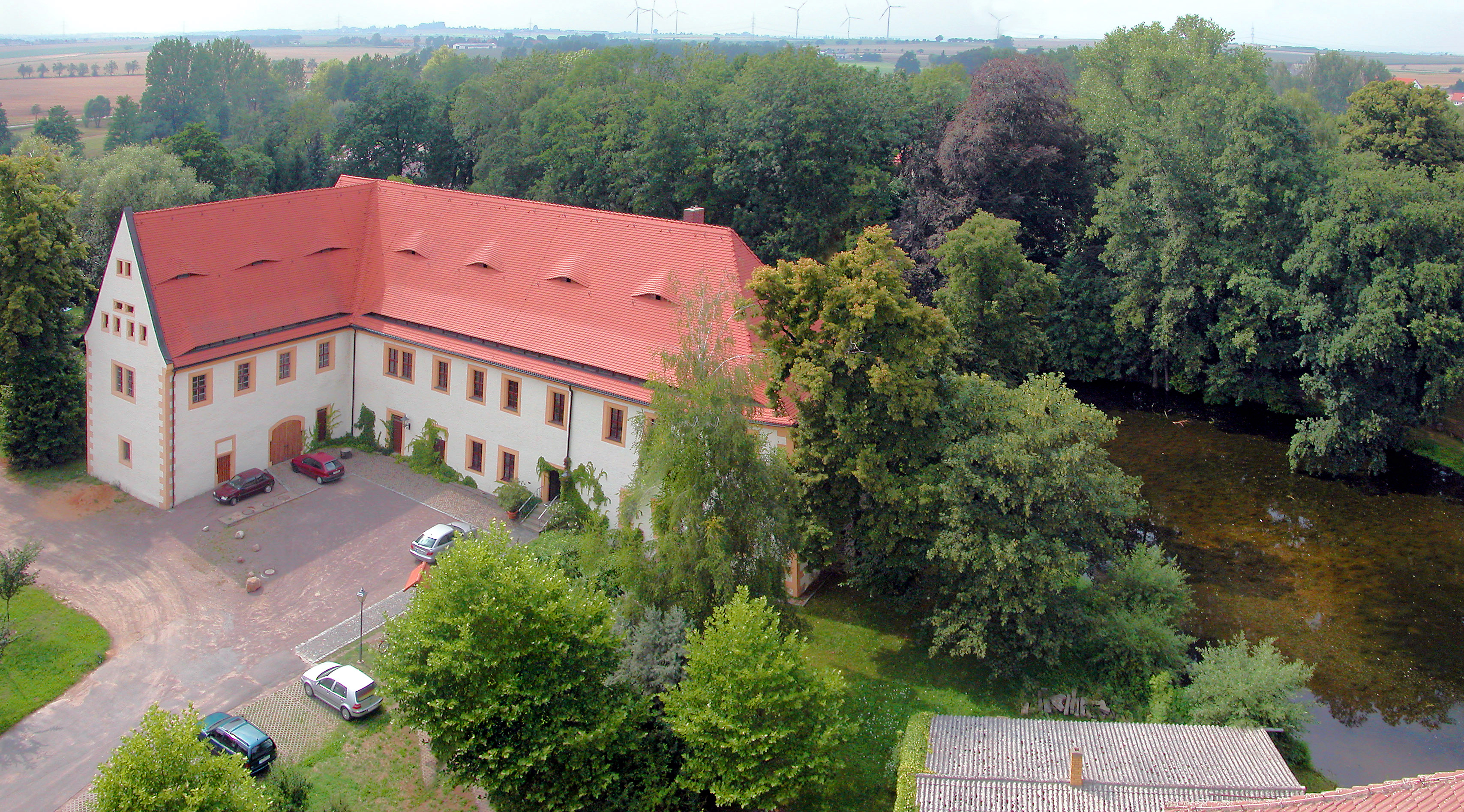 08.10.2006 04758 Hof (Naundorf bei Oschatz): Altes Schloß von Südosten (Renaissance um 1540). Heute Gemeindeverwaltung. [DSCN11119-111120.TIF]20060810280MDR.JPG(c)Blobelt